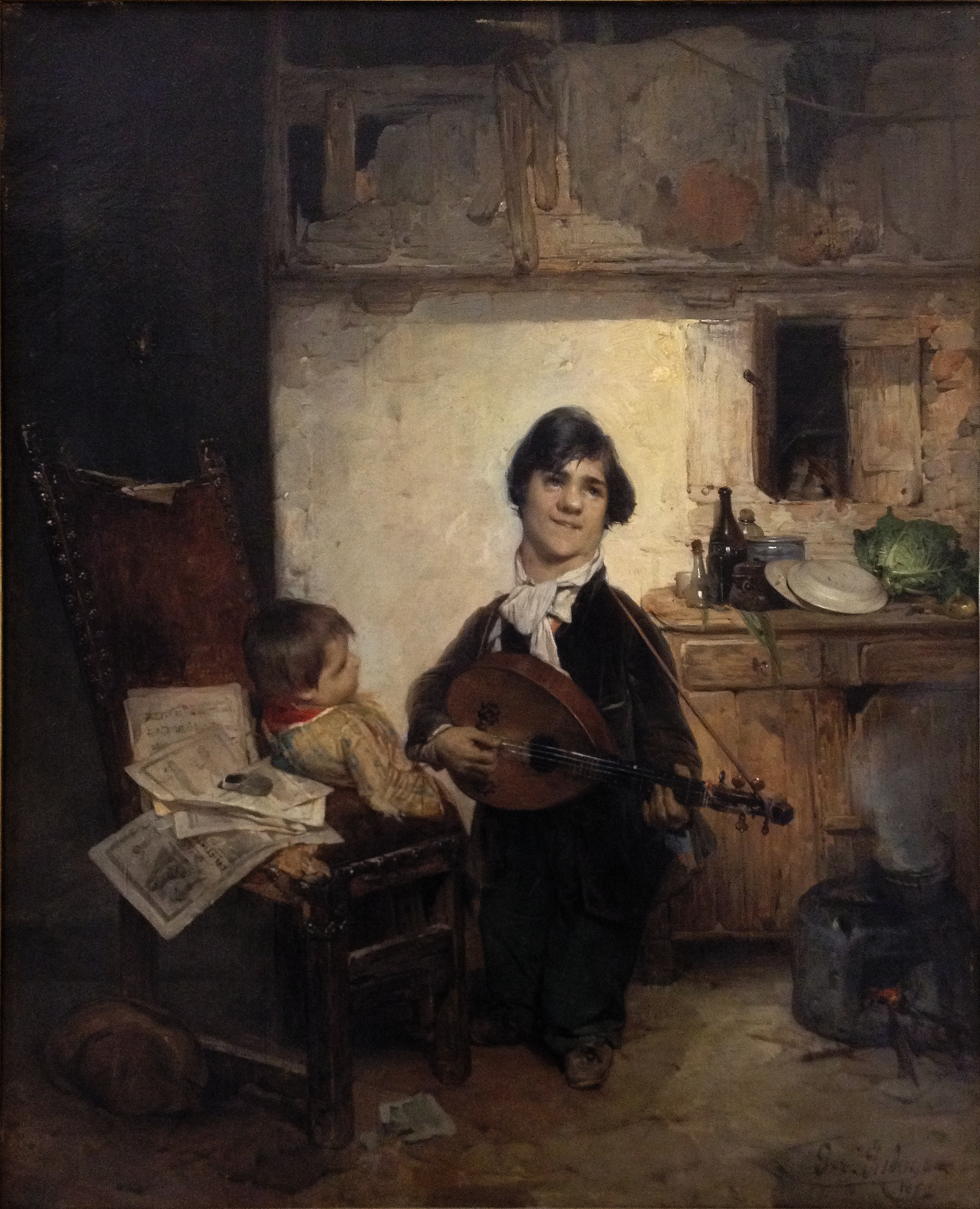 Gerolamo Induno - Sciancato che suona il mandolino (Il Cantastorie) 1852 - Olio su tela - Dono Antonio Negroni Prati Morosini, 1911